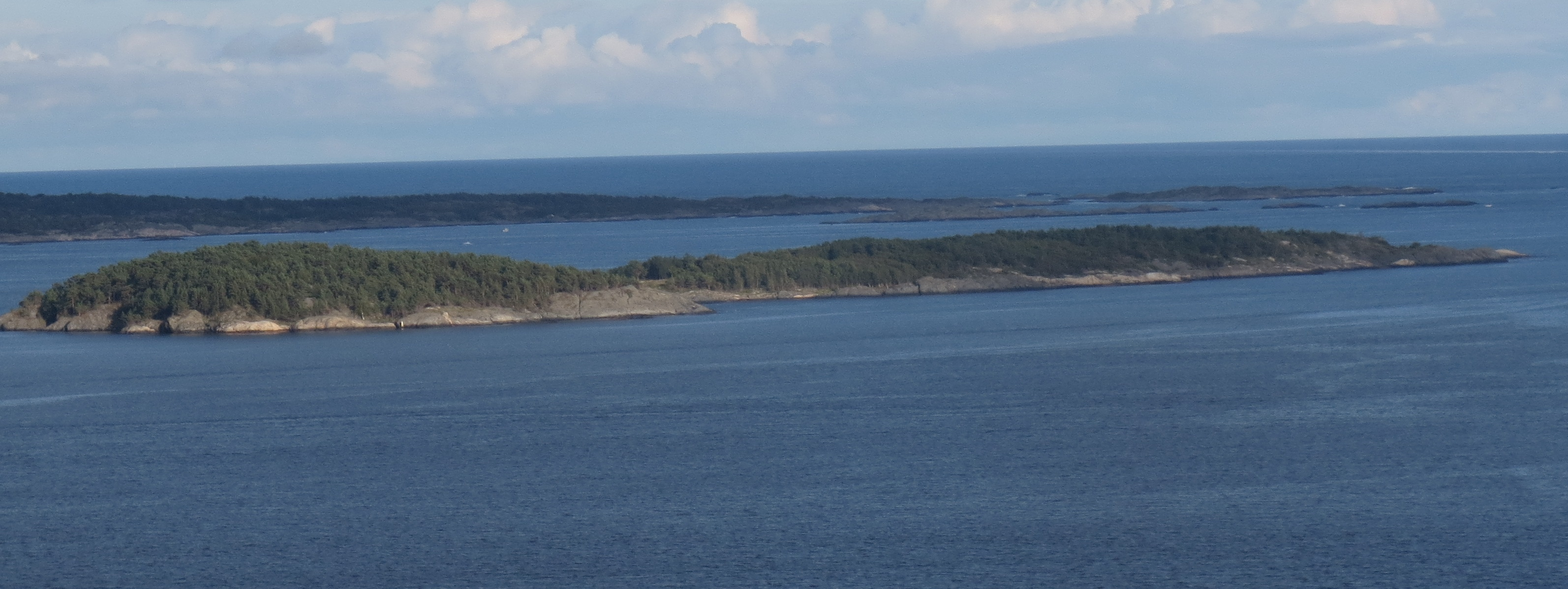 Dvergsøya - sett fra Odderøya Kristiansand